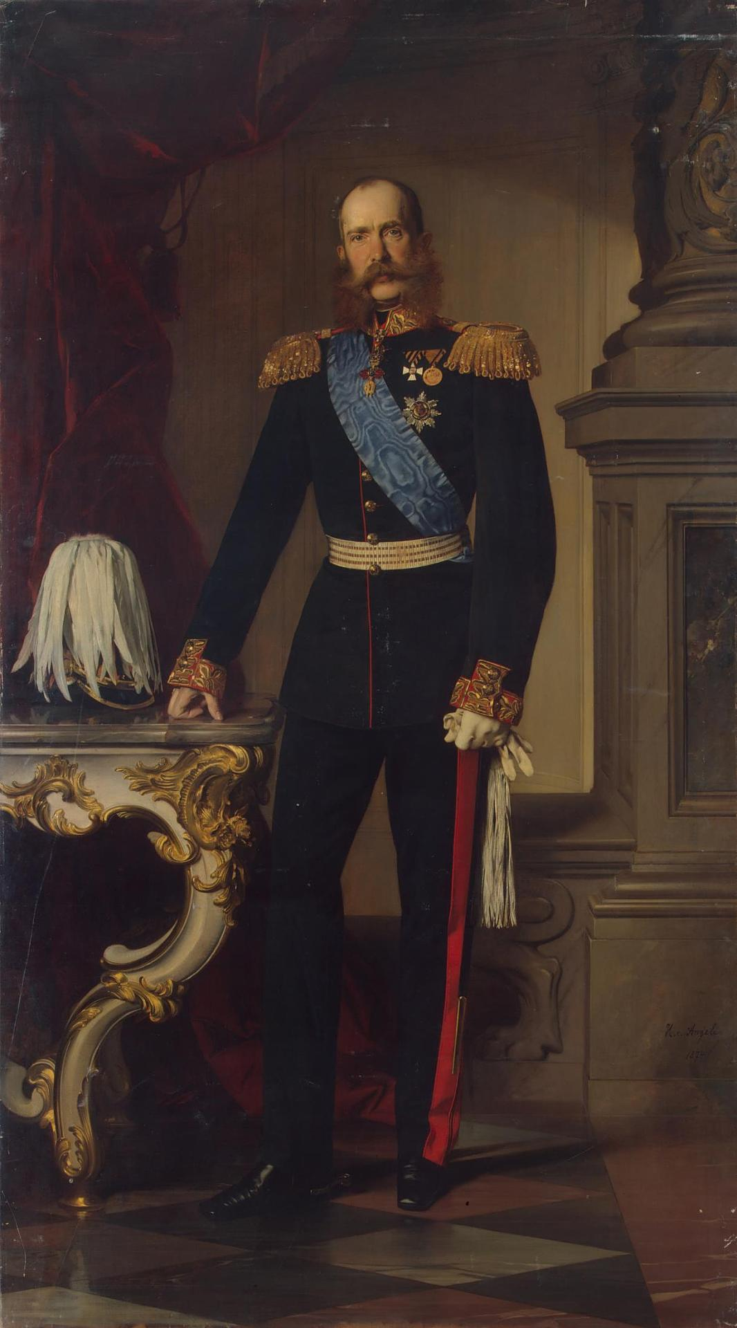 Franz Joseph I of Austria (Heinrich von Angeli, 1874)